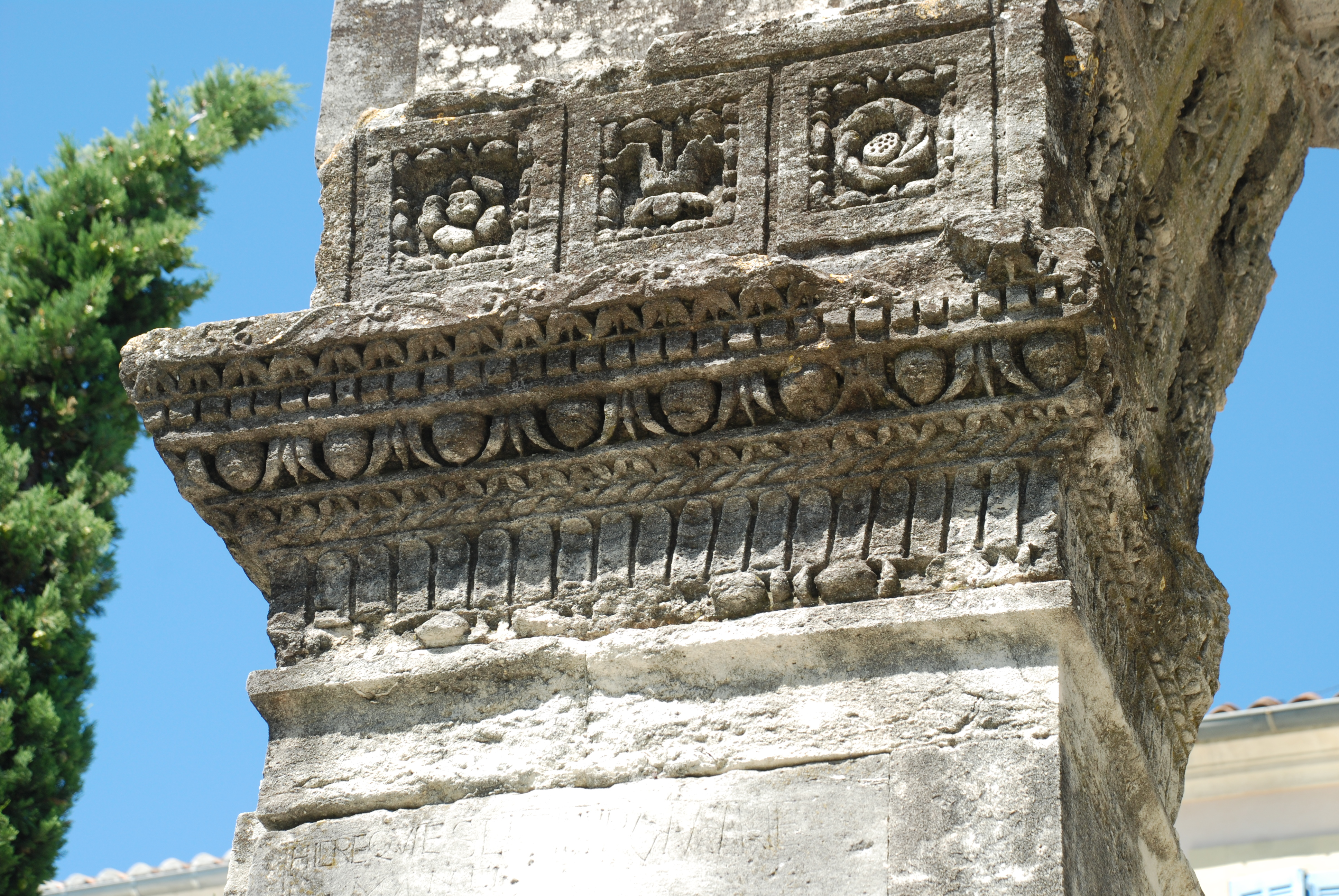 France - Provence - Vaucluse - Arc antique de Cavaillon